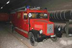 Schweres Löschgruppenfahrzeug (LF 15) (ehemals FFW Dinkelsbühl)